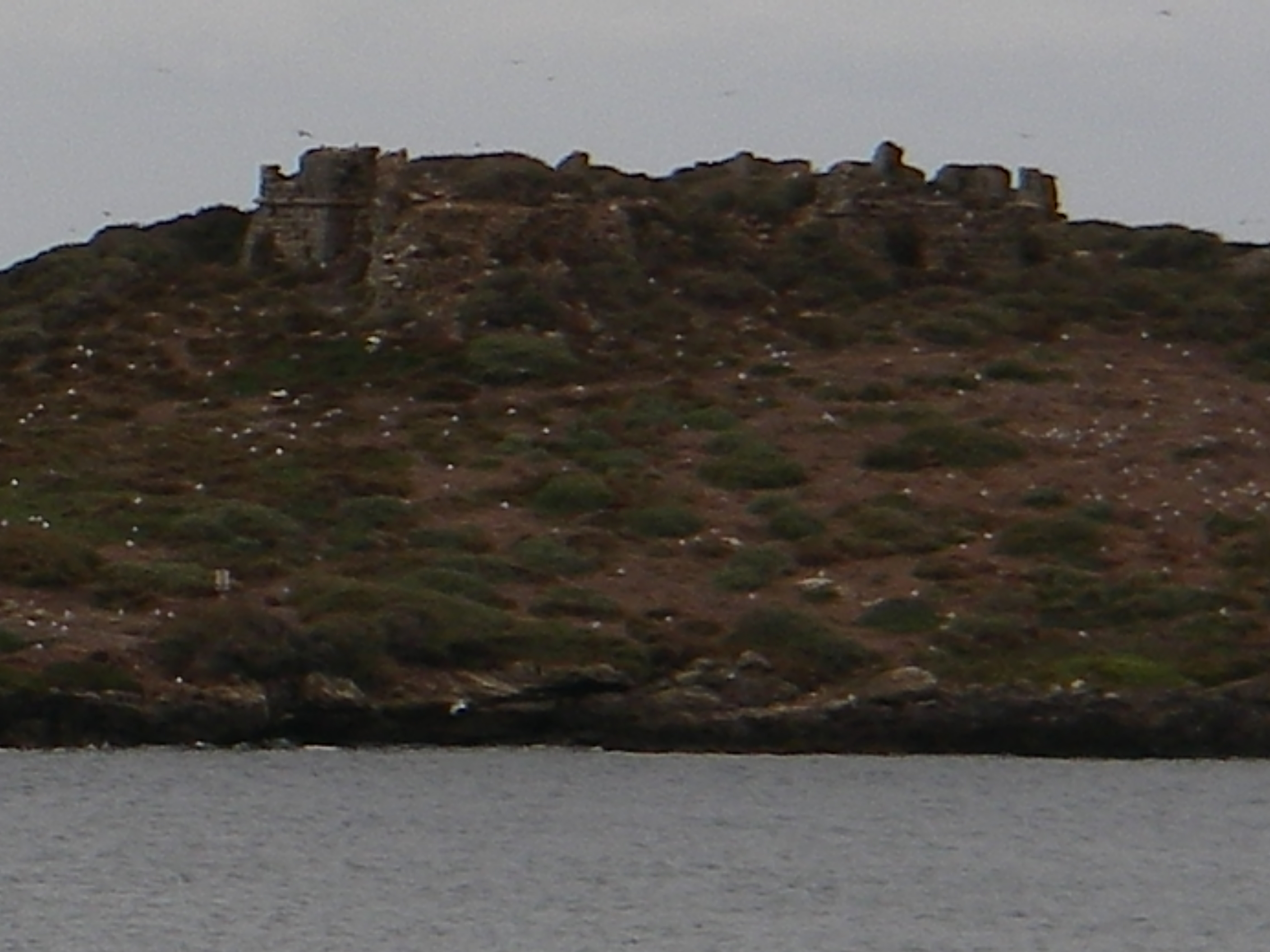 Forte do Pessegueiro